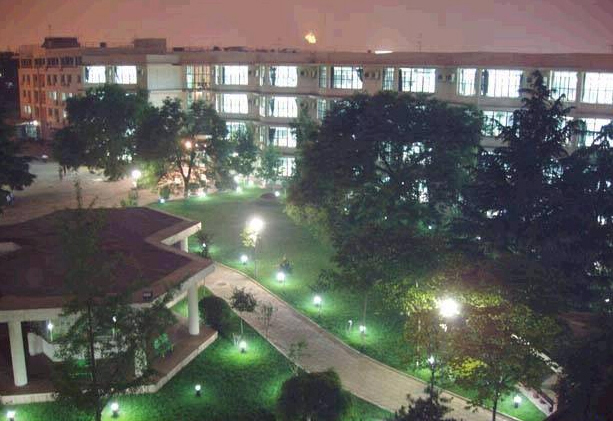 北京四中夜景